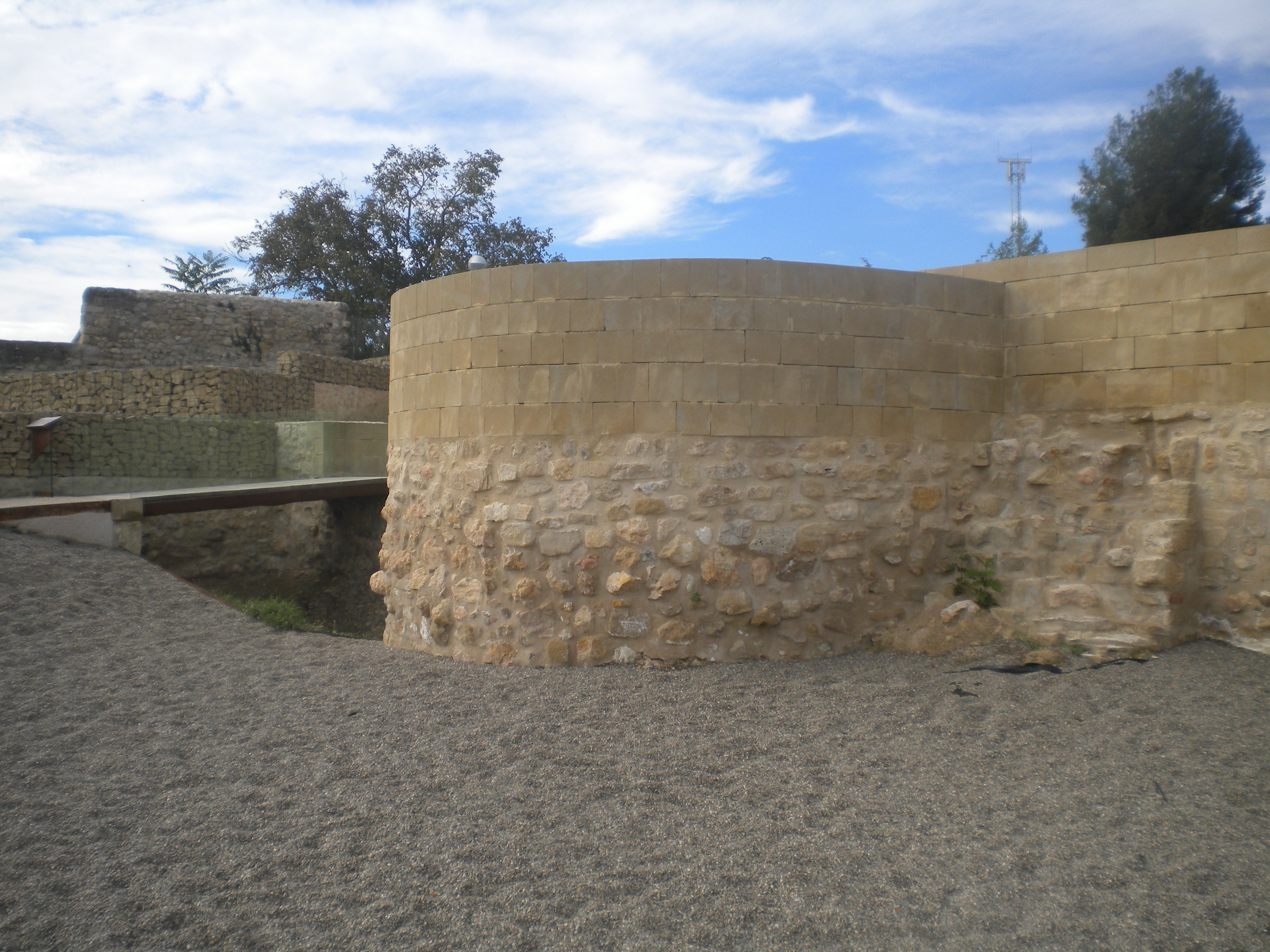 Torreón y puerta de acceso al Castillo de Miranda de Ebro (Castilla y León, España)